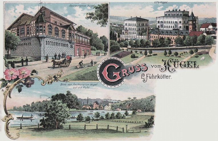 Postkarte der Villa Hügel und des Restaurants Hügel (heute Parkhaus Hügel) vom damaligen Betreiber Führkötter